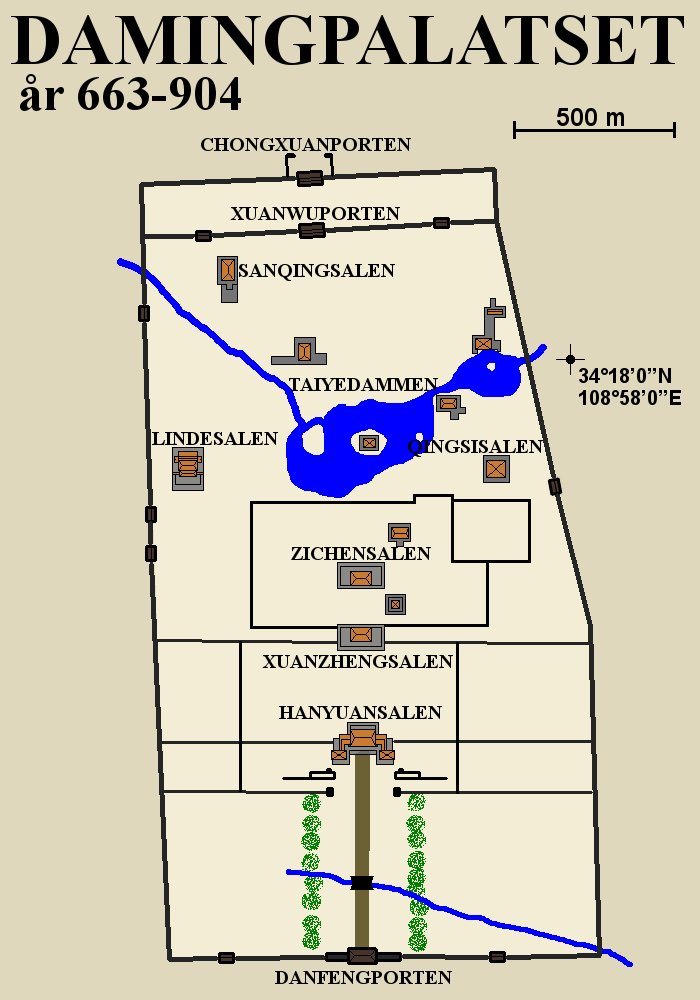 Karta över Damingpalatset från Tangdynastin